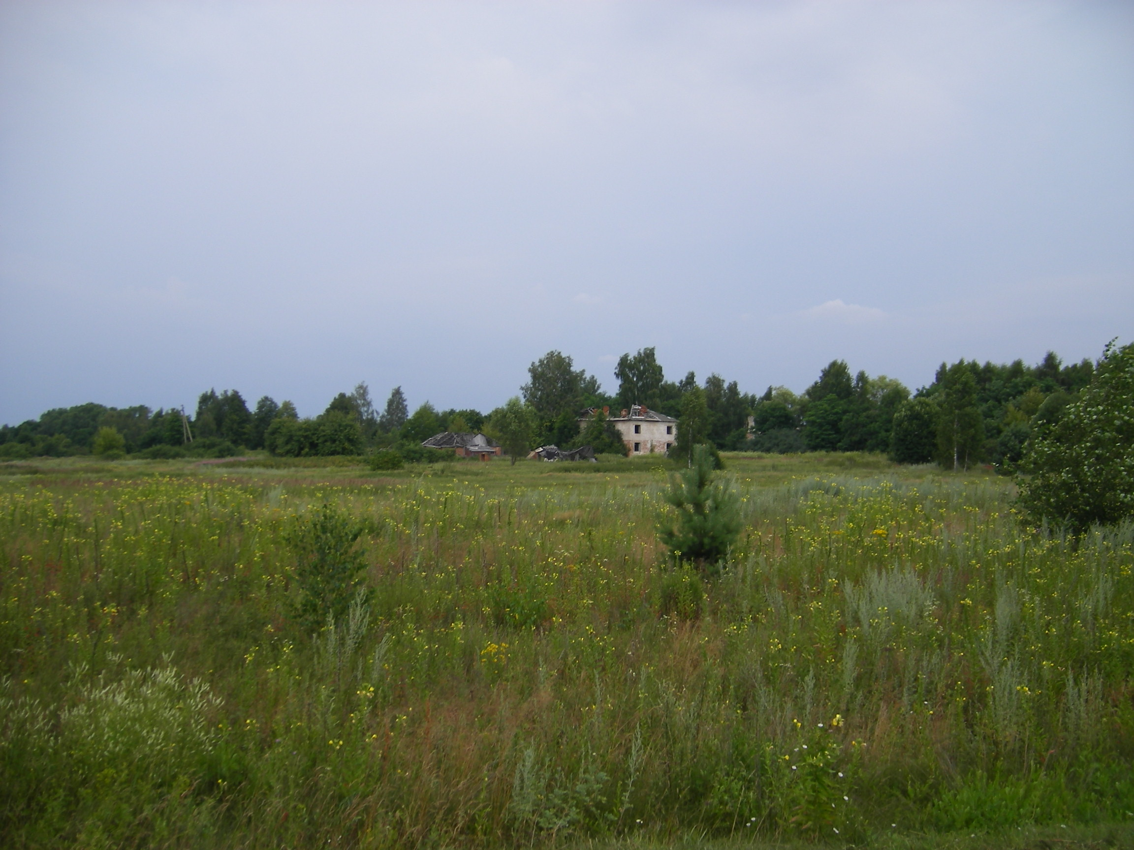 Bartolomeyevka (evacuated village) in Vetka Raion, Homel Oblast